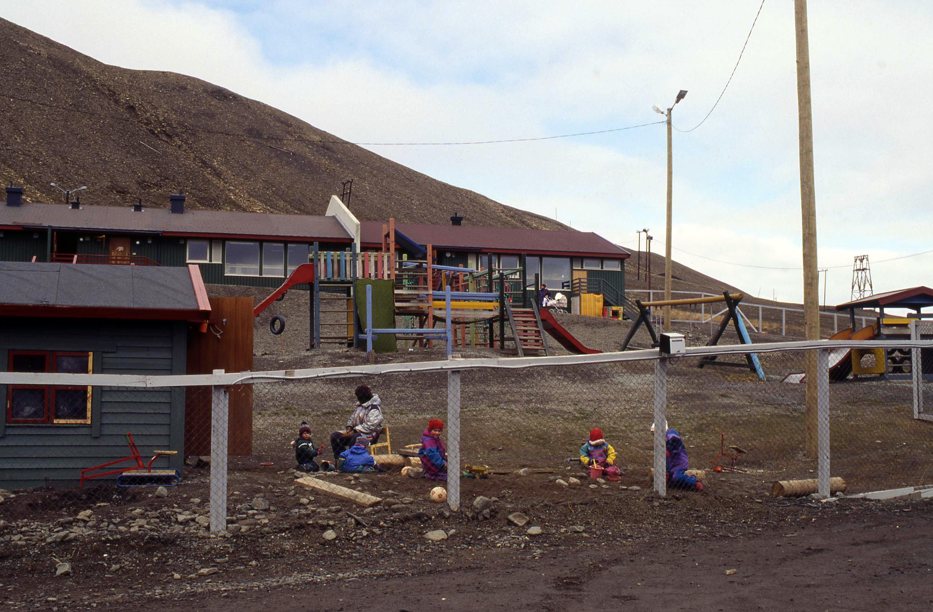 Speelterrein en school in de zomer. De omheining is nodig daar er ijsberen kunnen rondzwerven.